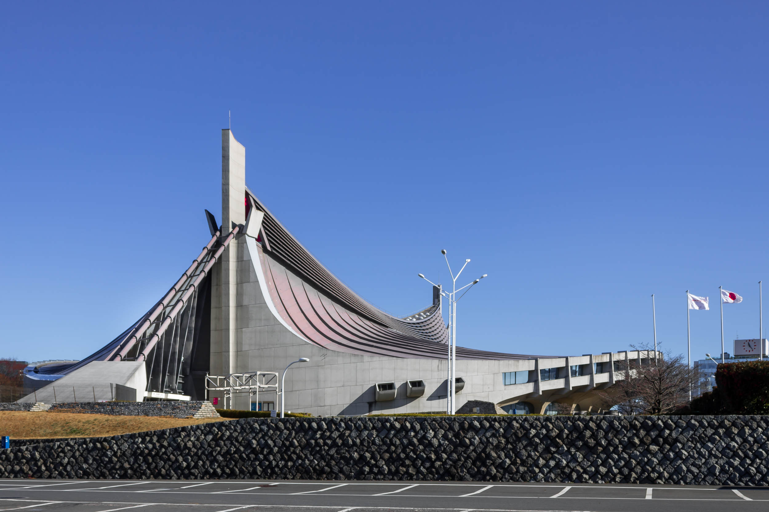 国立代々木屋内総合競技場,第一体育館。設計丹下健三。